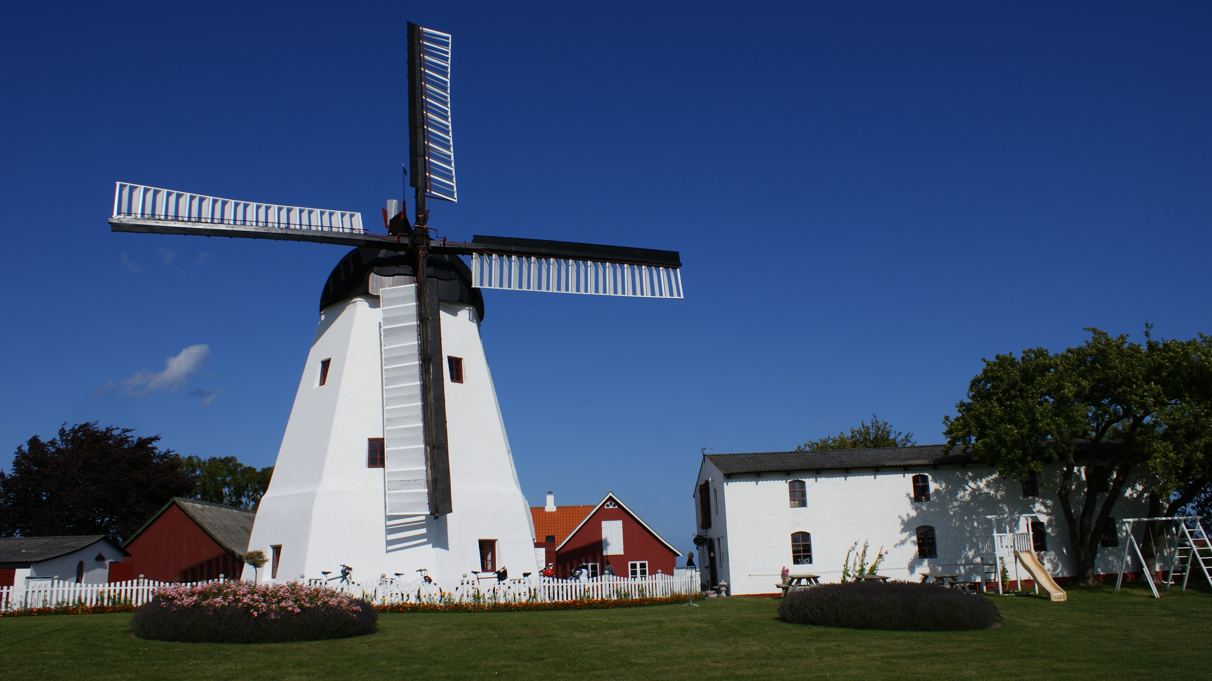 Windmill at Årsdale, Bornholm, Denmark. Built 1877.